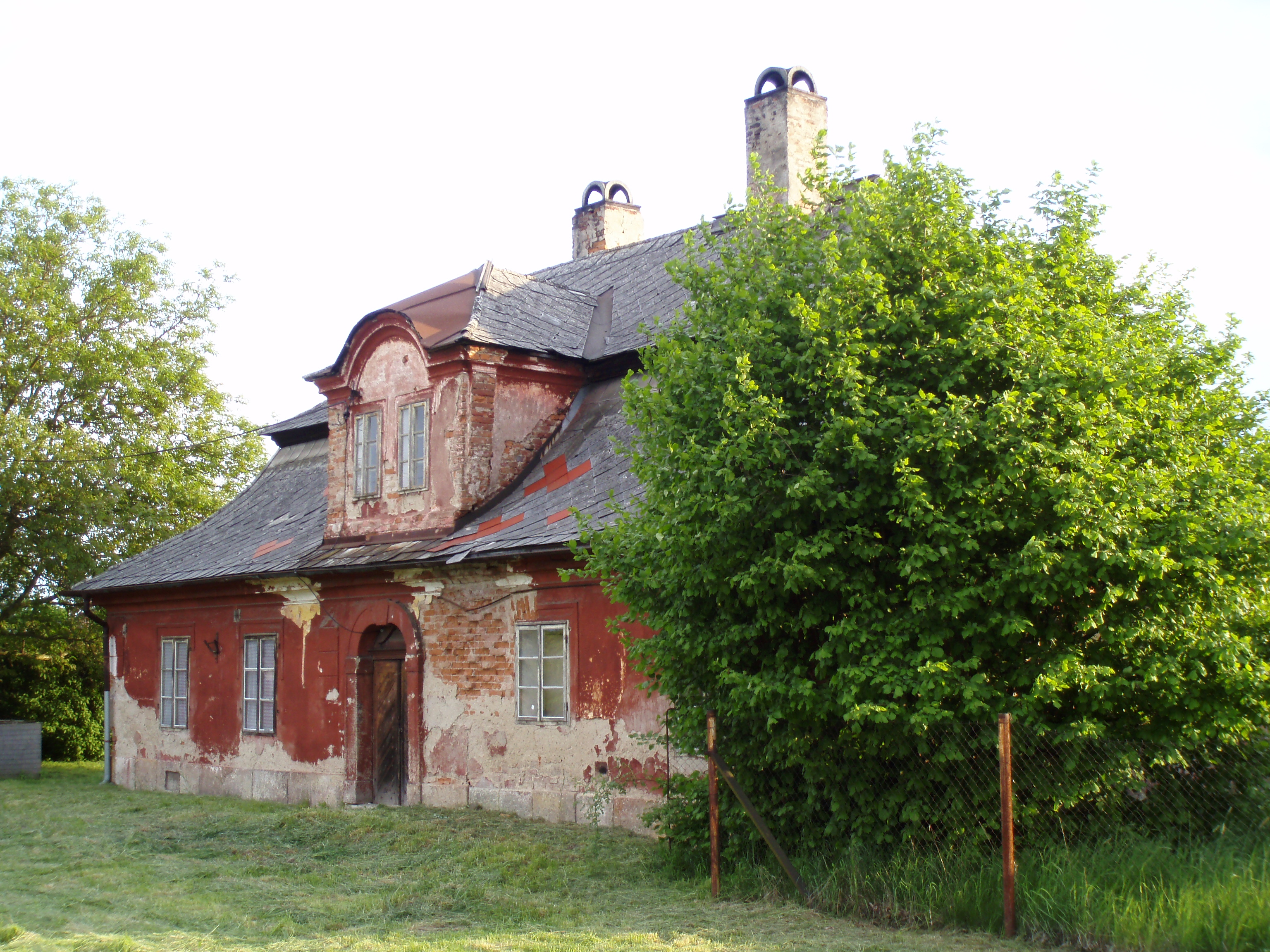 Cerveny dvur (Hradec Kralove)